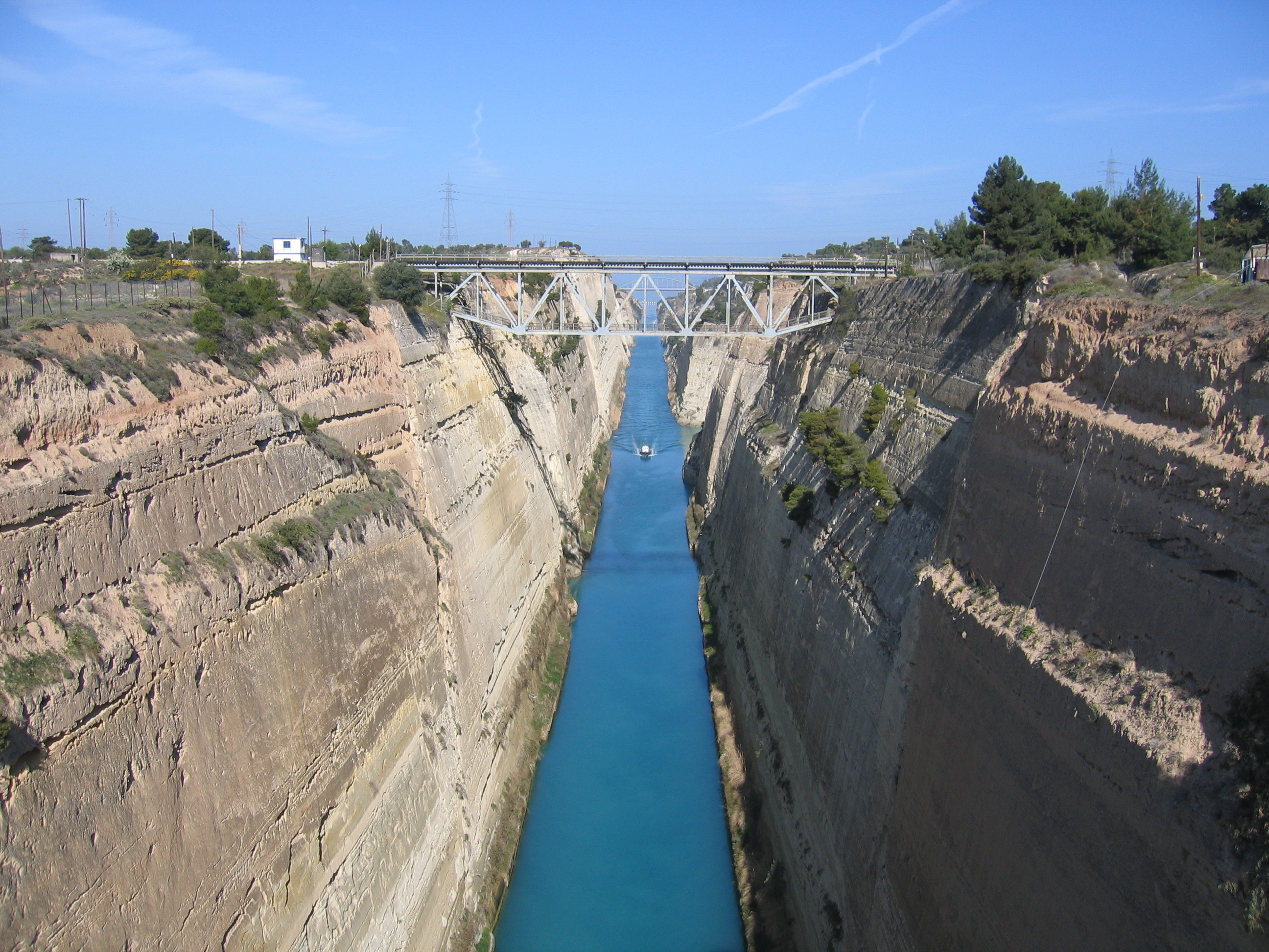 Canal de Corinto. Grecia